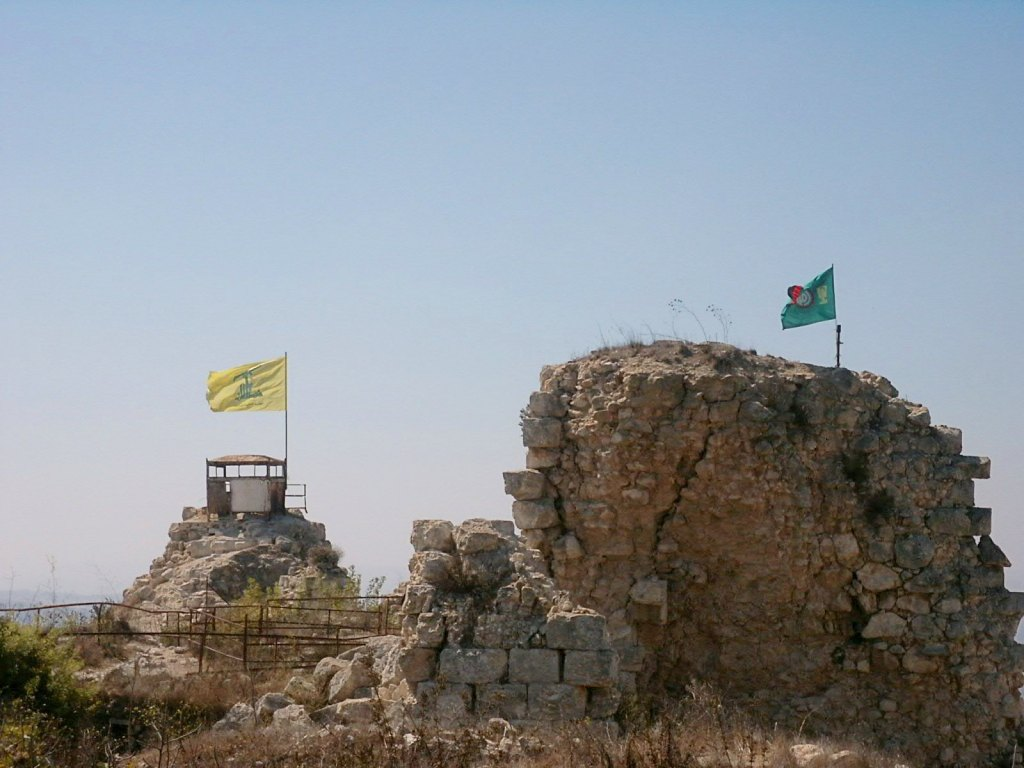 Détail de la forteresse de Beaufort (Sud Liban) Sept 2003